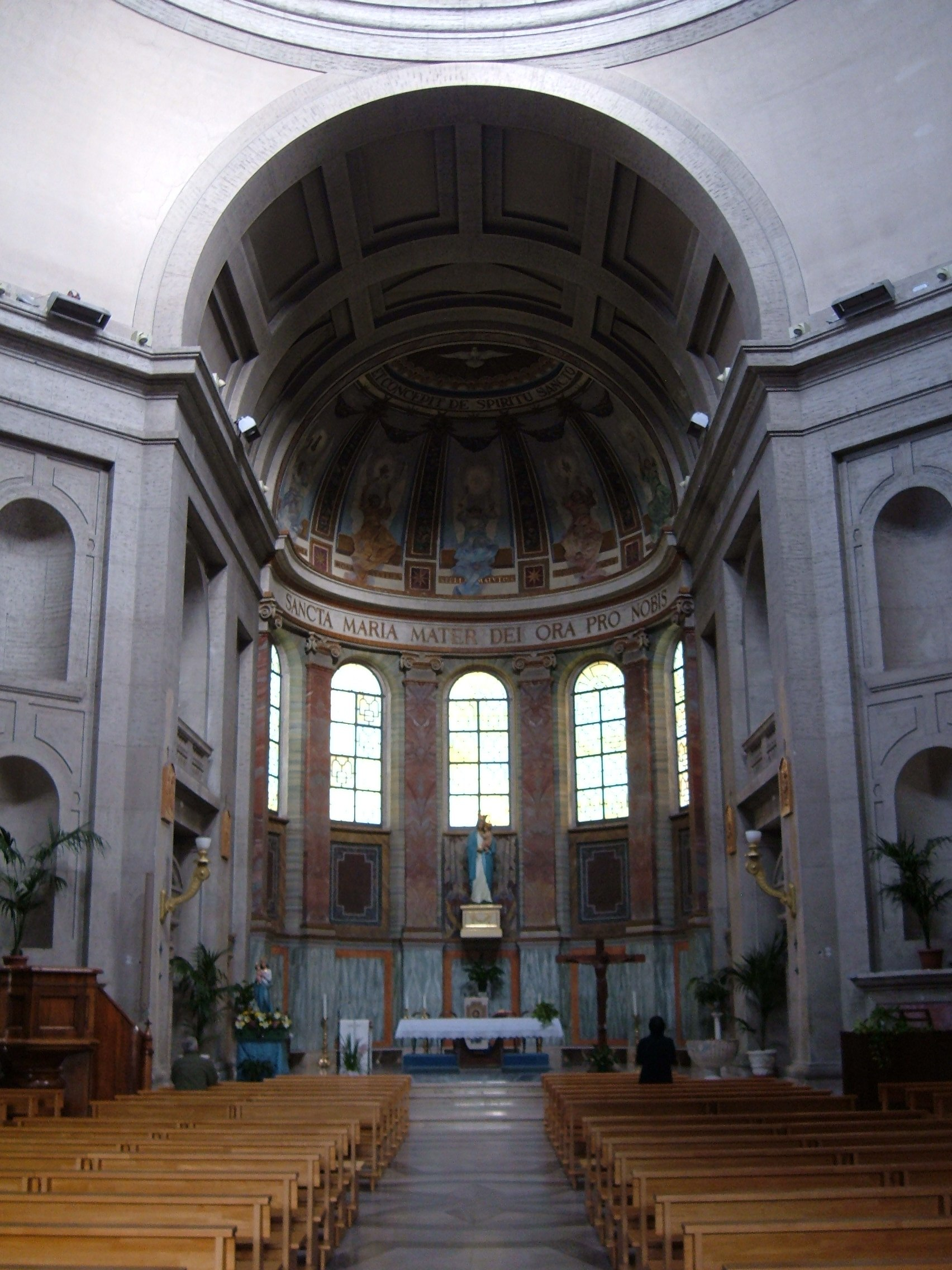 Chiesa della Gran Madre di Dio, a Roma, nel quartiere Della Vittoria.